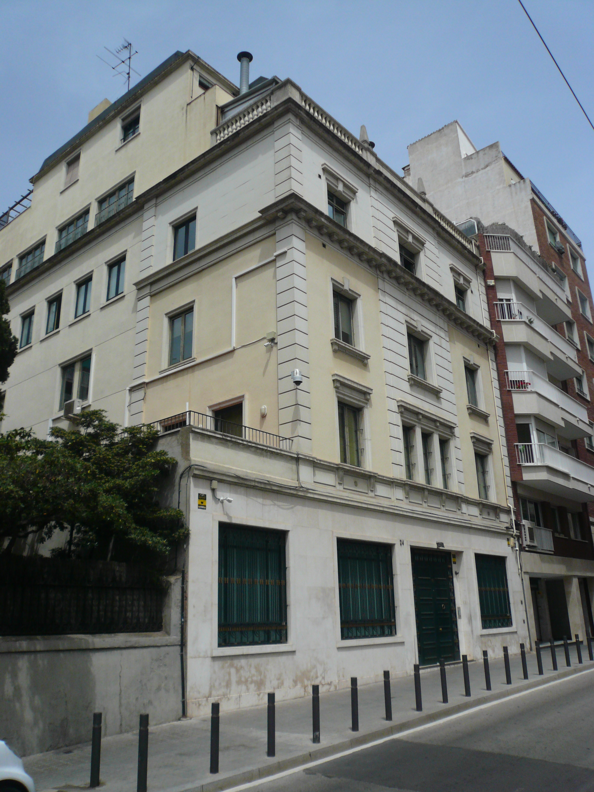 Sinagoga de la Comunitat Israelita de Barcelona, al carrer Avenir